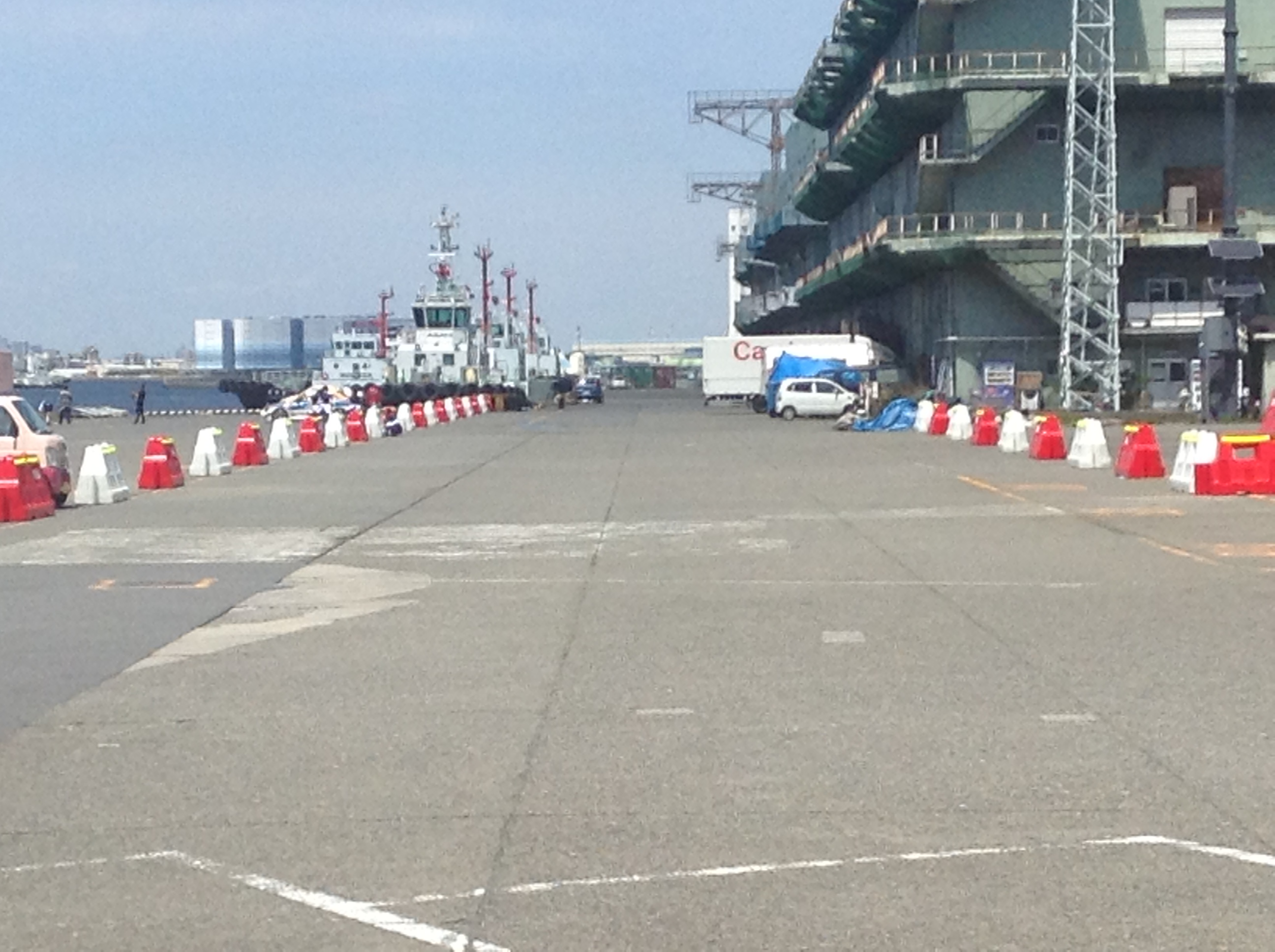 不協和音撮影地の山下ふ頭